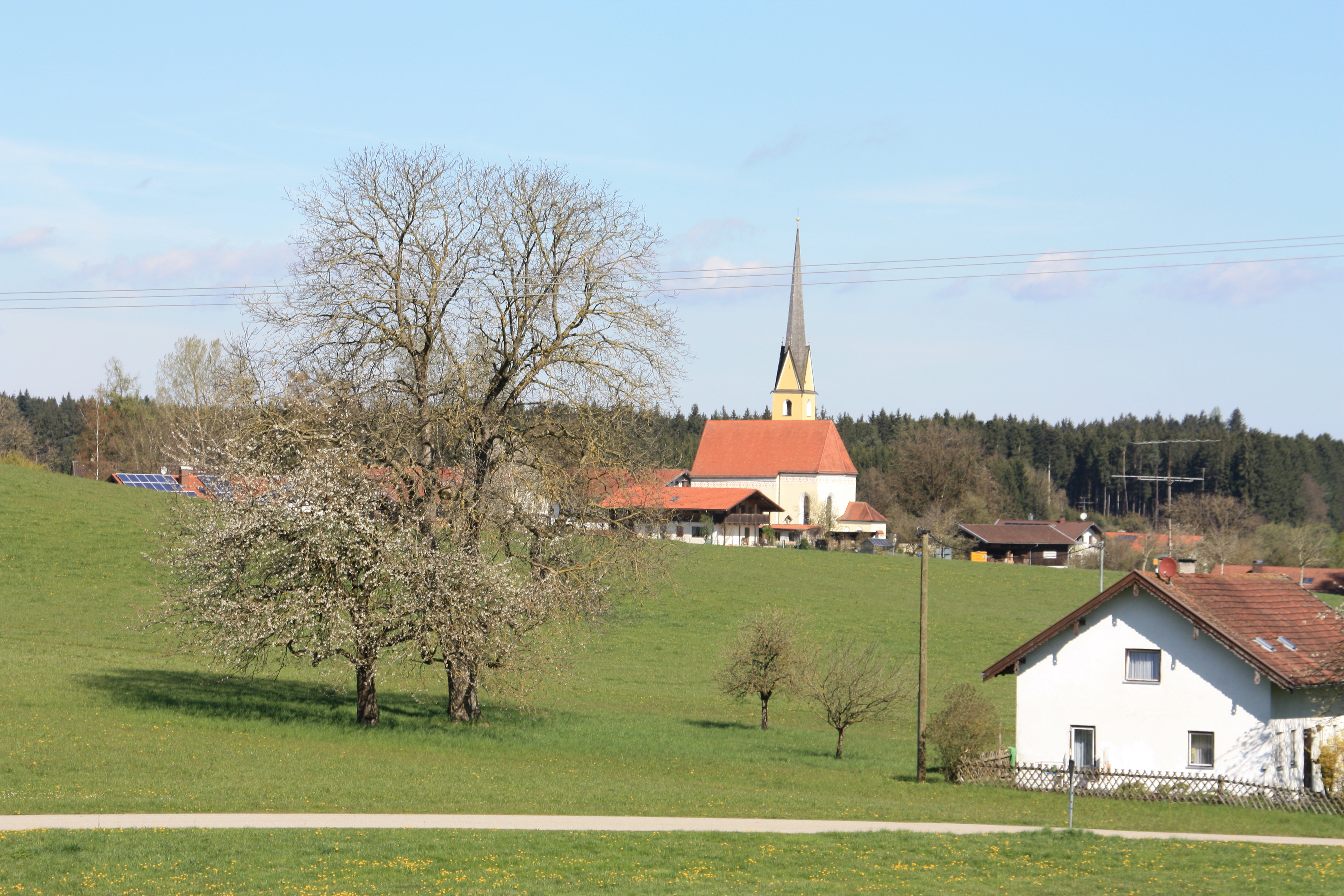 Babensham OT Kirchloibersdorf